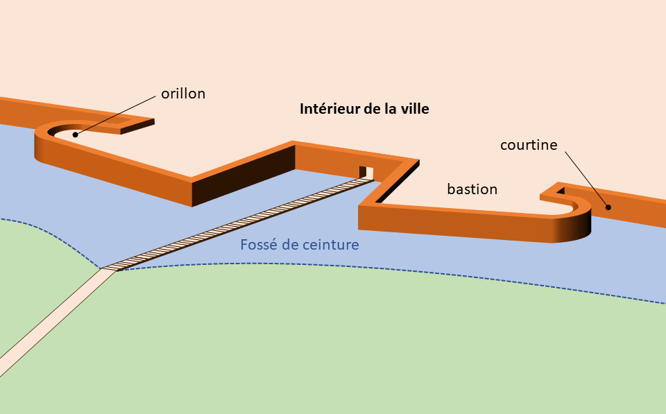 Porte et bastion de l'enceinte du XVIe-XVIIe siècle à Tours